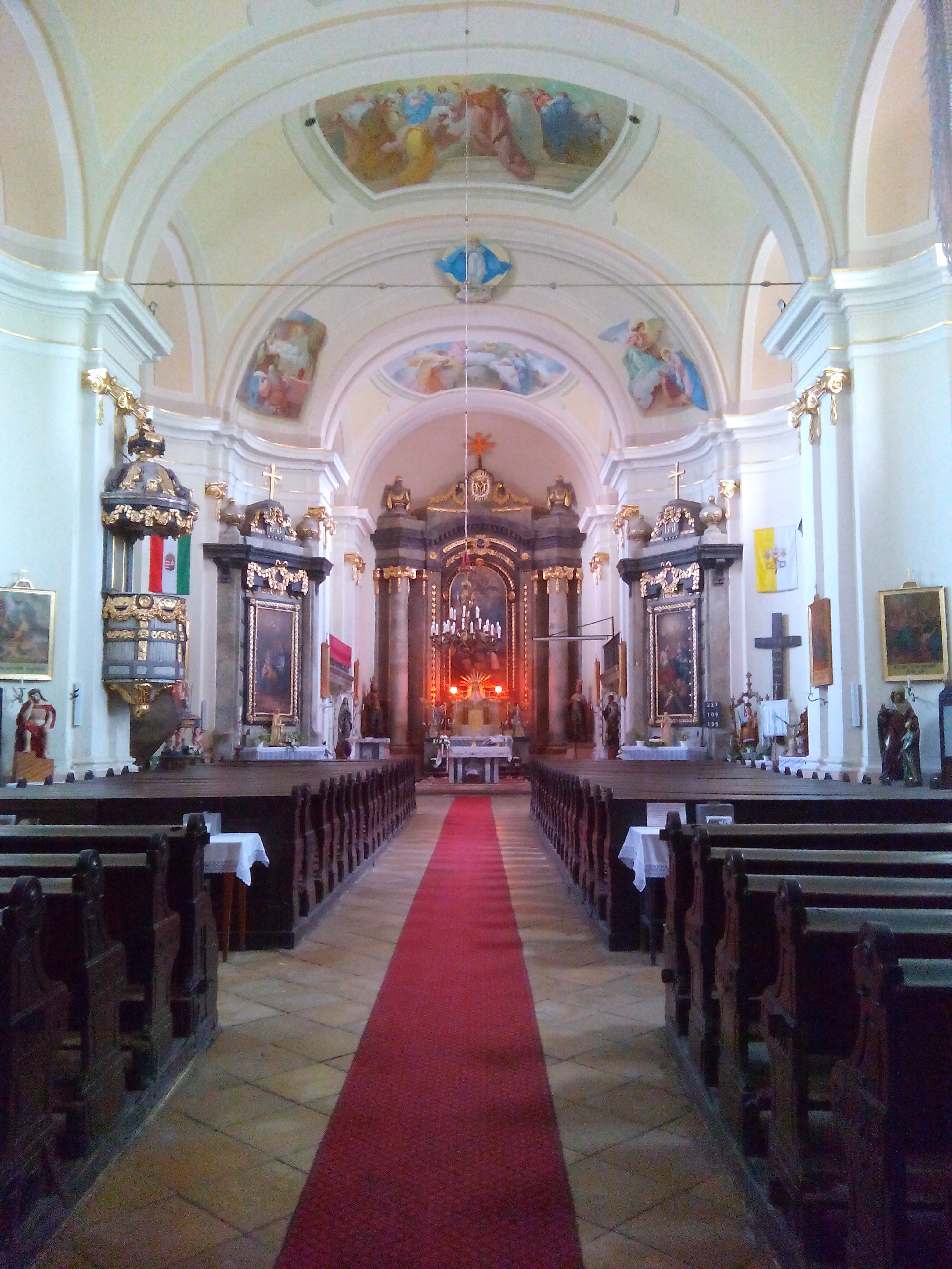 Jászladány római katolikus templom belső